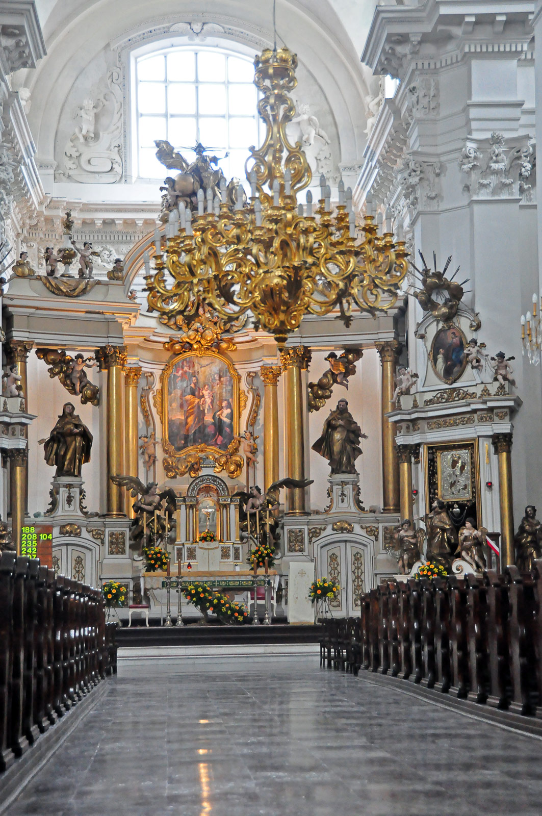 Warszawa - kościół karmelitów bosych